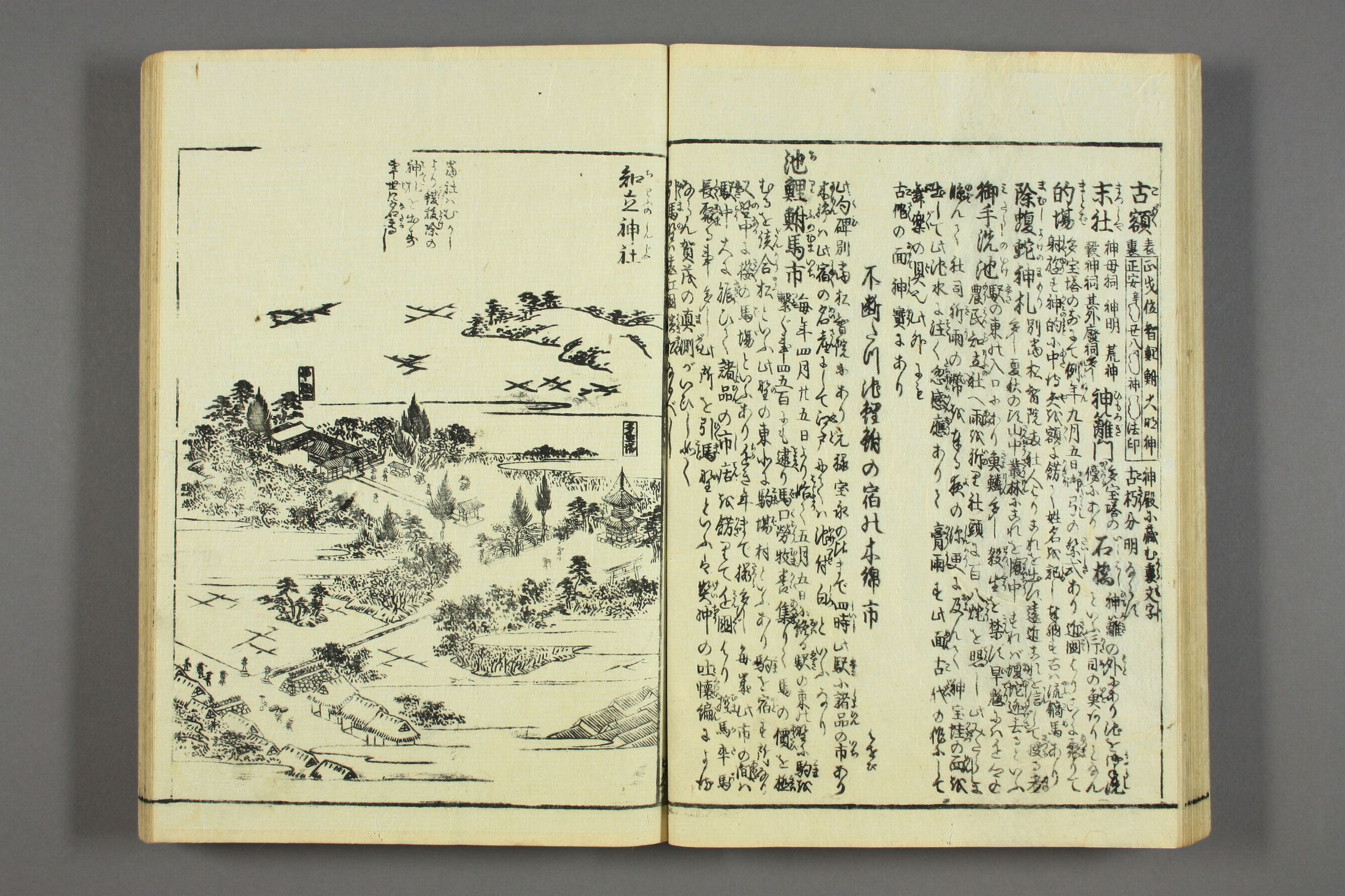 Tokaido meisho zue - 1797 - vol 3 p 29